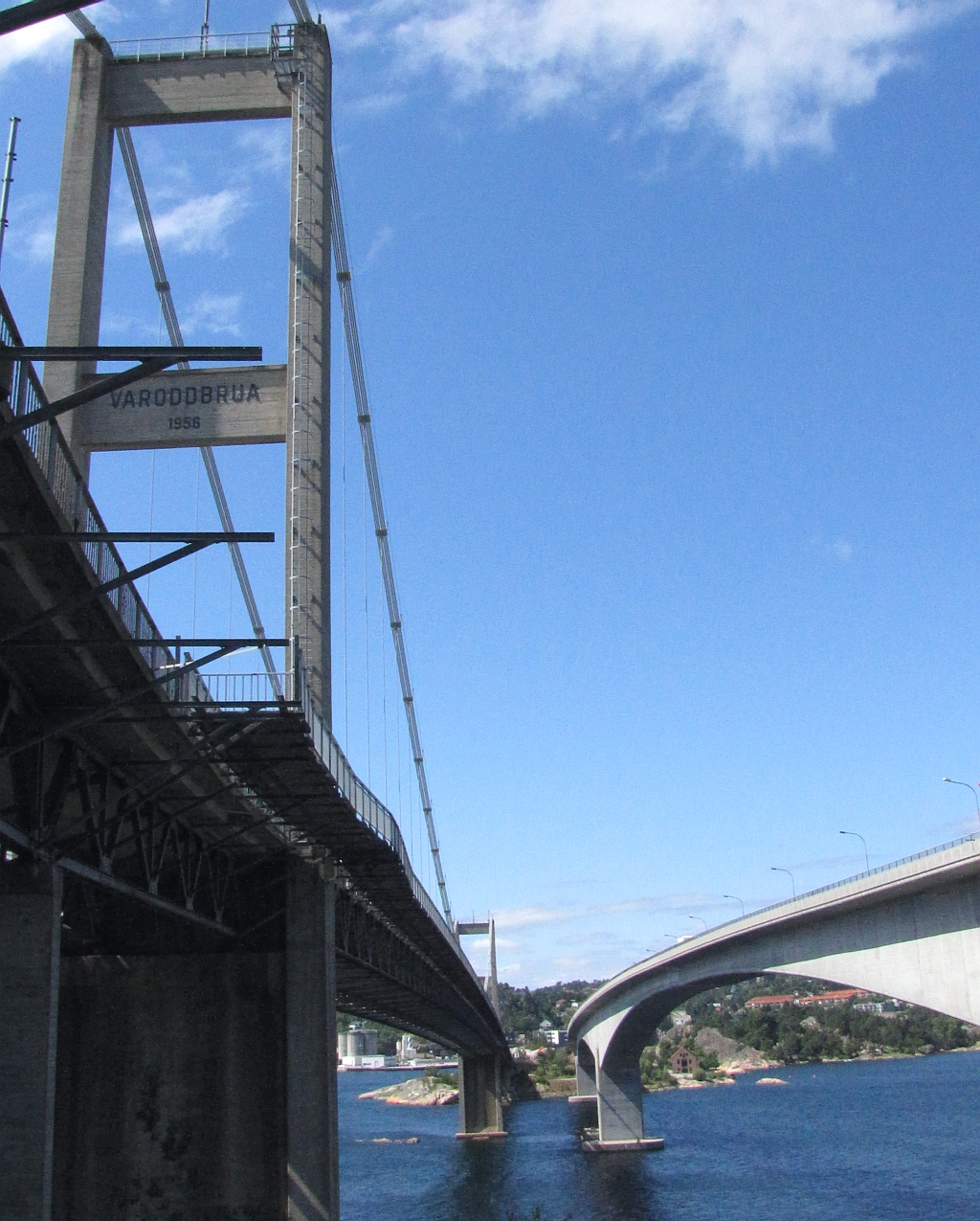 links die alte Varodd-Brücke, rechts die neue Brücke in Kristiansand (Norwegen) - gamle & nye Varoddbrua Foto Wolfgang Pehlemann DSCN1602. Die alte Brücke aus dem Jahr 1956 besitzt eine Länge von 618 m und eine Spannweite von 337 m; die neue Brücke aus dem Jahr 1994 wurde mit einer Länge von 663 m und der größten Spannweite von 260 m errichtet. Über den Brückenkomplex führt die Europastraße 18 (E18), und zwar stadteinwärts nach Kristiansand über die neue Brücke, stadtauswärts über die alte Tragseilbrücke.